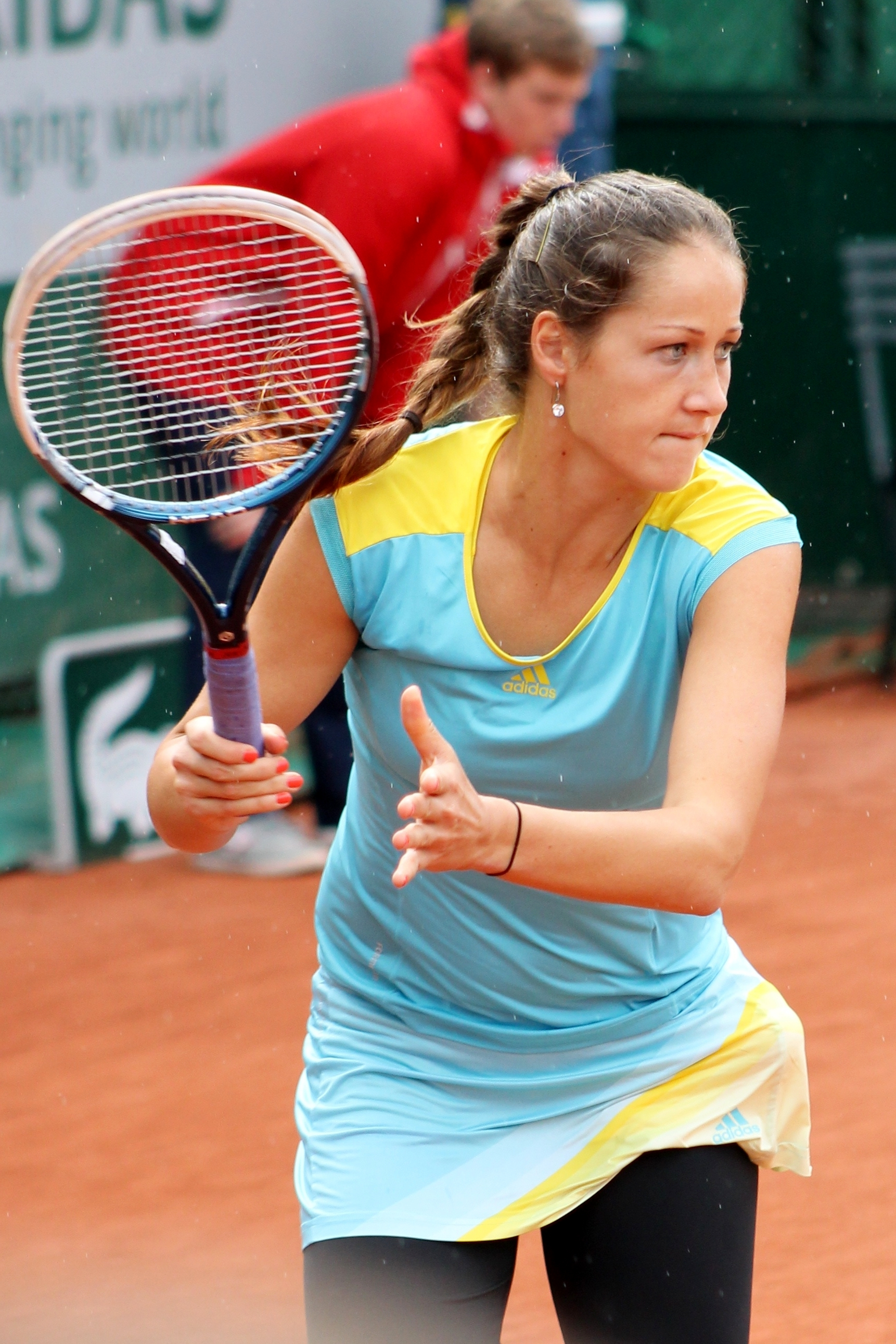 Jovanovski RG13 (3)